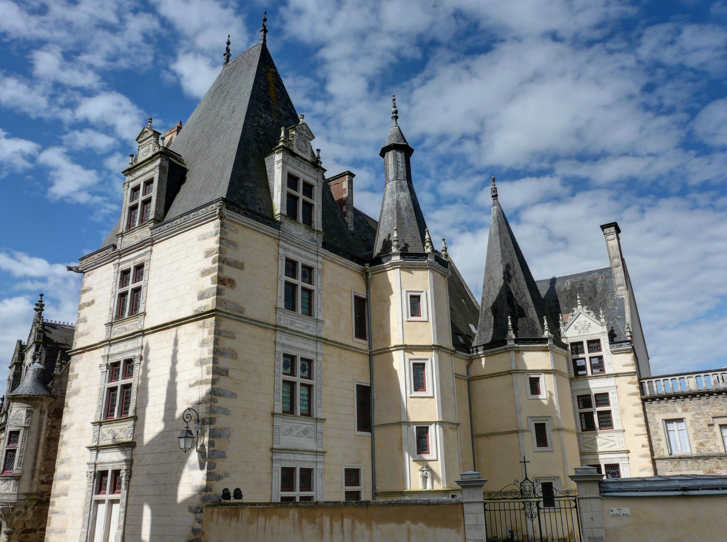 Palais du Grabatoire en 2016 apres ravalement